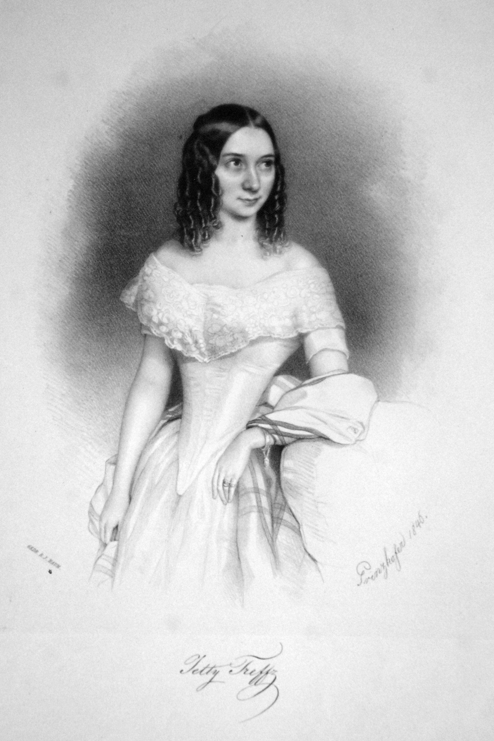 Henriette Treffz, geb. Chalupetzky (1818-1878), österreichische Sängerin Soubrette. 1. Frau von Johann Strauß, Sohn. Lithographie von August Prinzhofer, 1846.